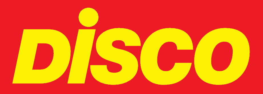 Zeichen Disco Supermarkt